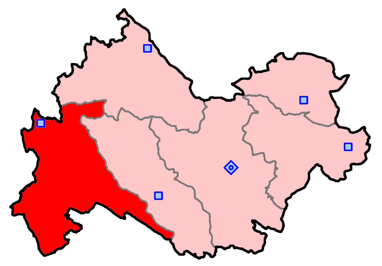 حوزه‌ قصر شیرین برای انتخابات مجلس شورای اسلامی